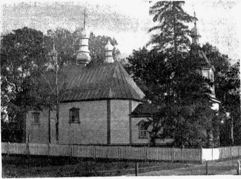 Беларуская (тарашкевіца): Арэхава (Arechava). Царква Сьвятой Параскевы Пятніцы